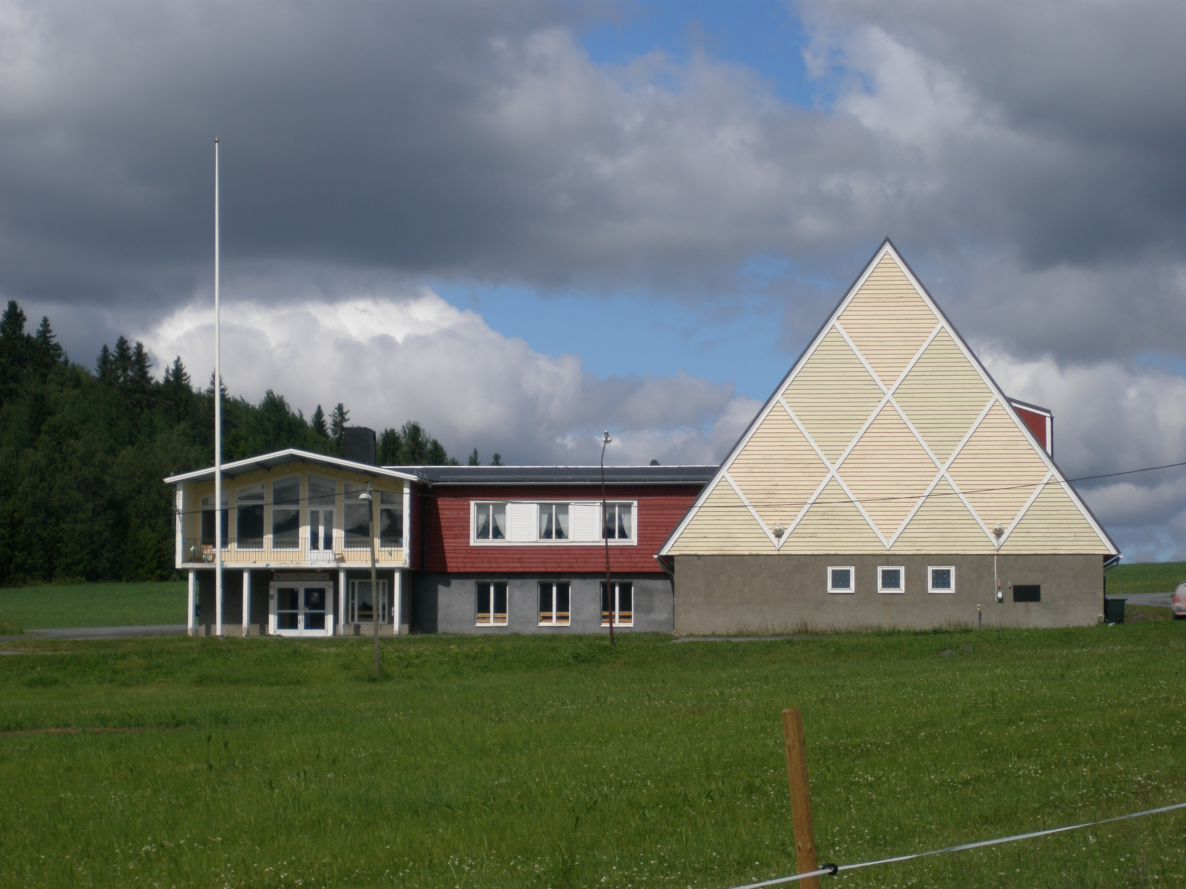 Kaxås Bygdegård, Offerdal, Krokoms kommun, Jämtland, Sweden.